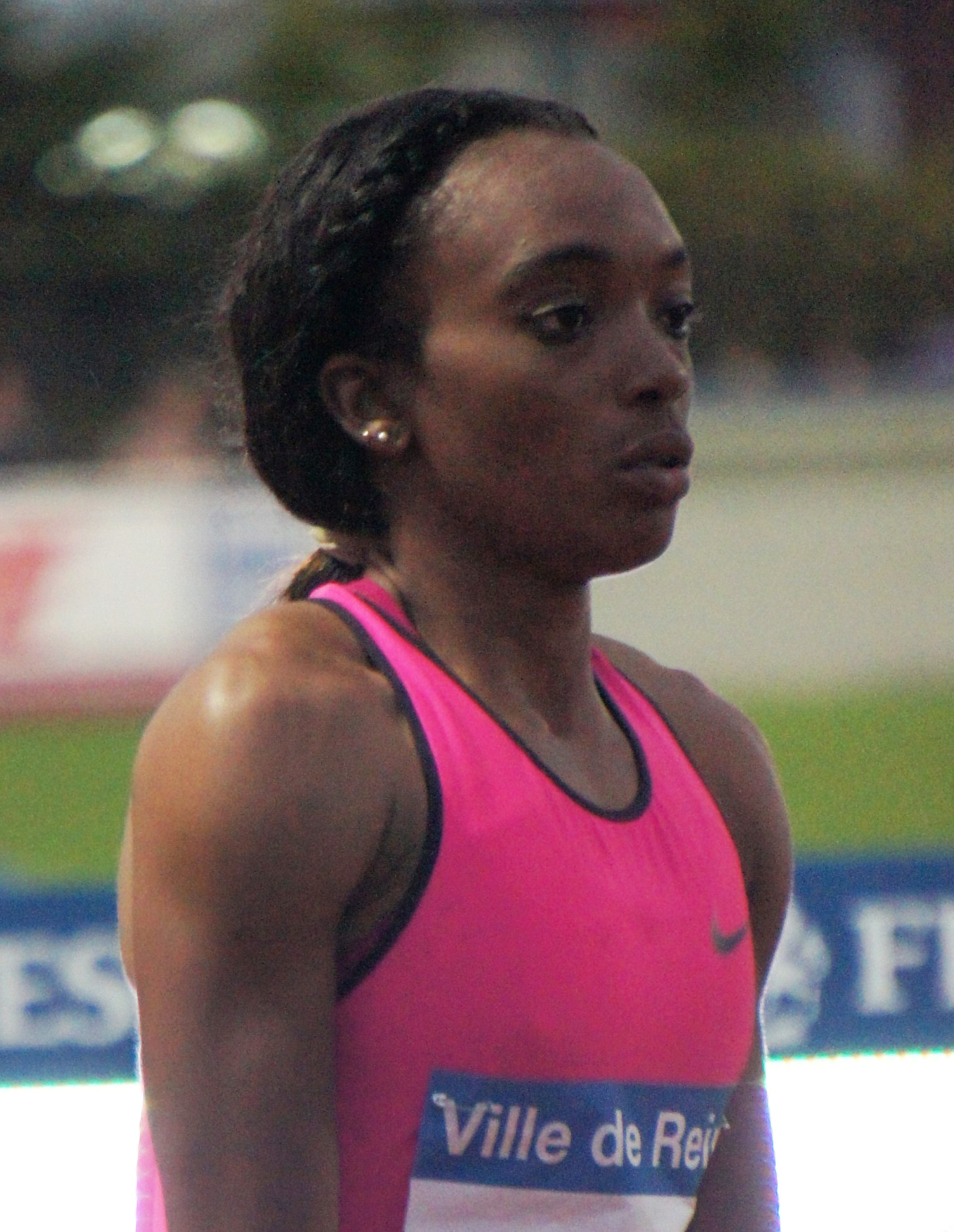 Christine Day lors des Rencontres d'athlétisme de Reims 2013 .